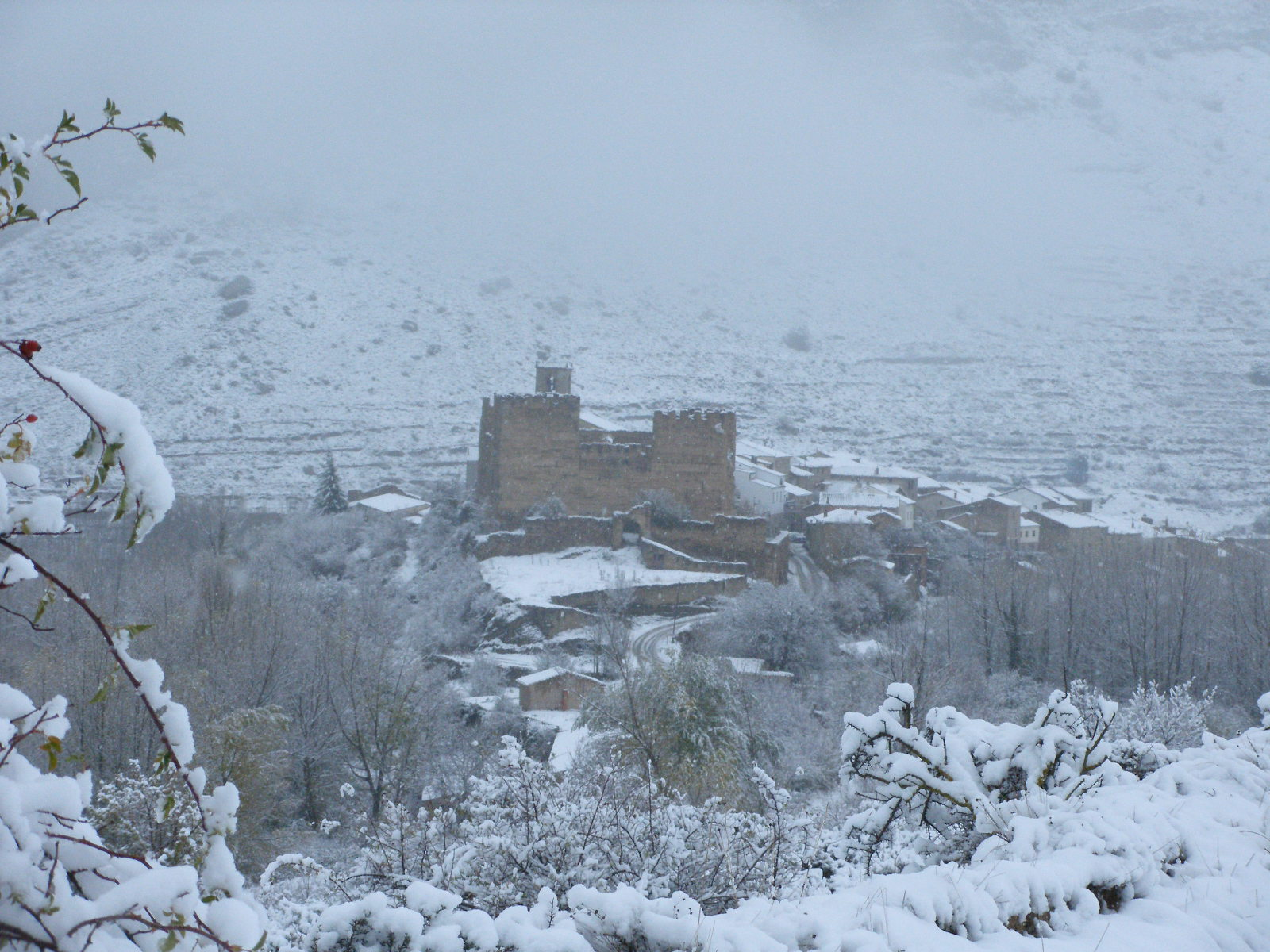 Yanguas, en Soria (España)